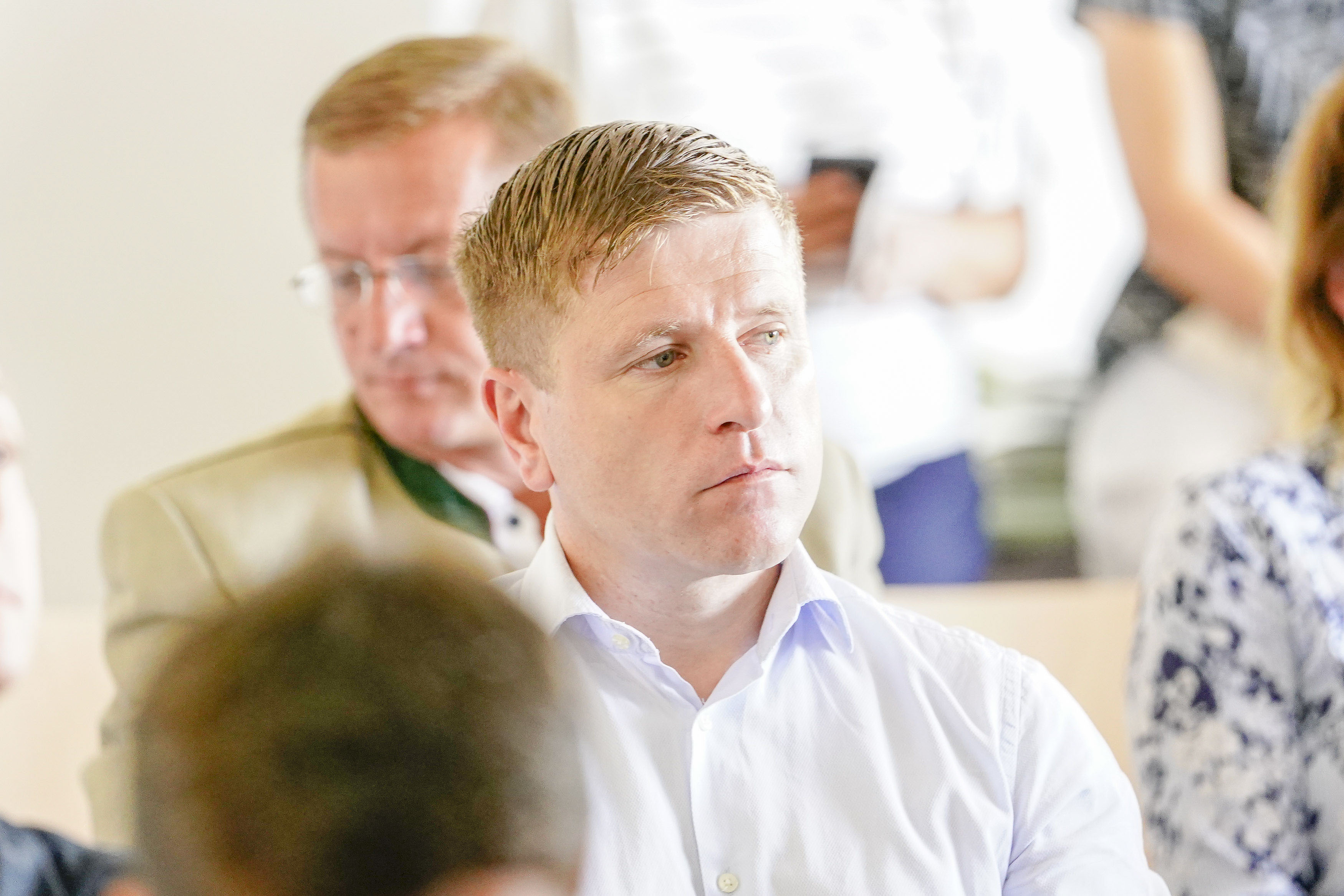 Landtagspräsident Karl Wilfing besuchte mit den Abgeordneten des NÖ Landtages die Garten Tulln, als eines jener Projekte, die im Landtag beschlossen wurden. Fotos: NÖ Landtag/Bollwein